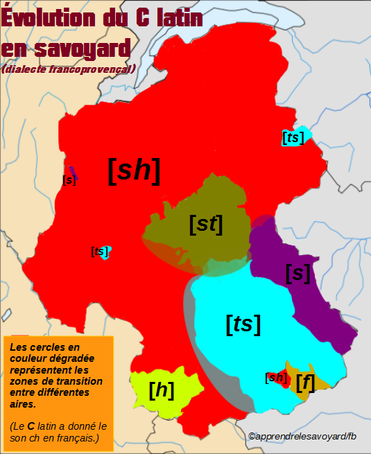 Carte représentant l'évolution dans la langue savoyarde du C+A latin.